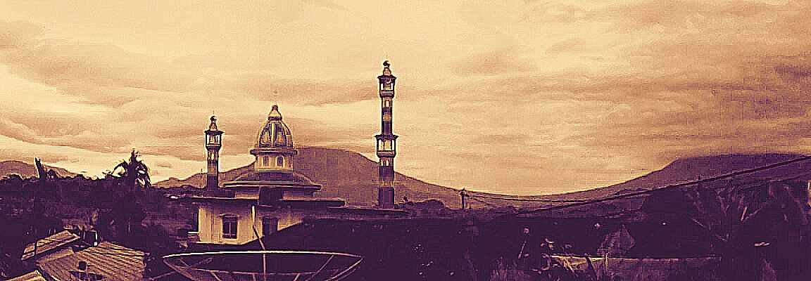 Gambar tersebut menunjukkan Masjid Al Maksum Desa Mangunrejo